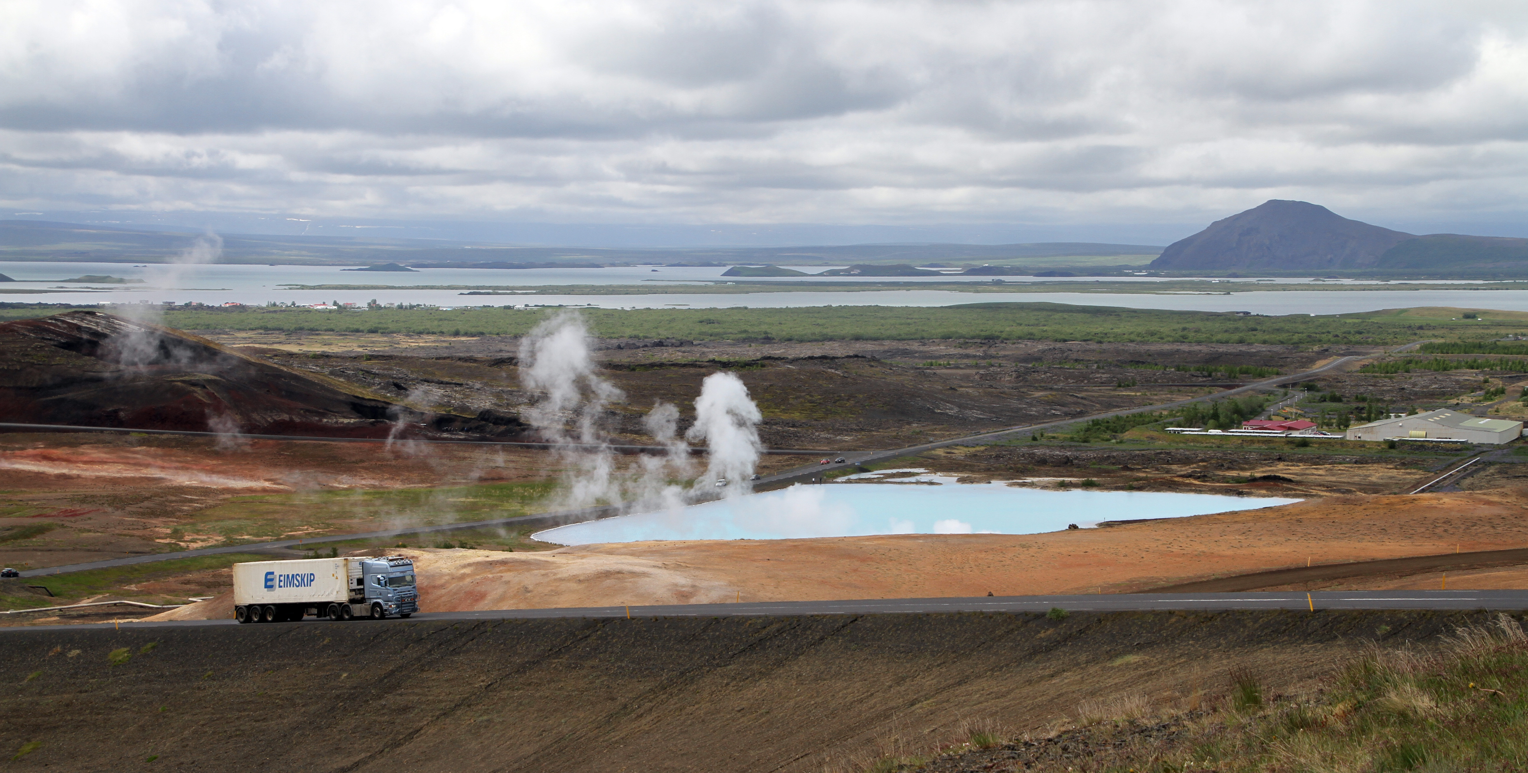 Mývatn von Jarðböðin